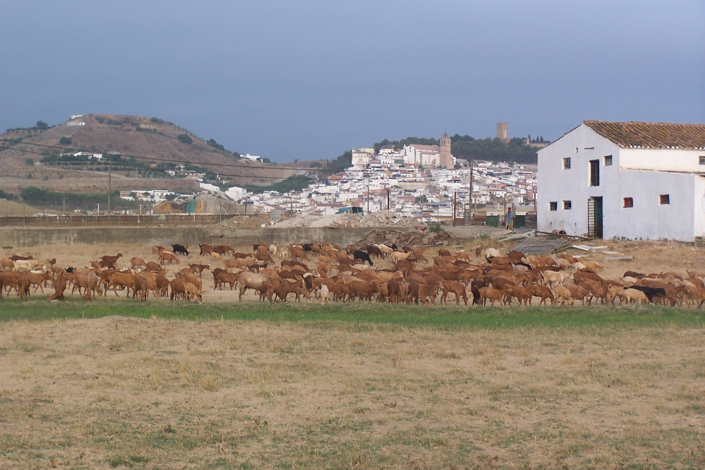 Velez-Malagaz.